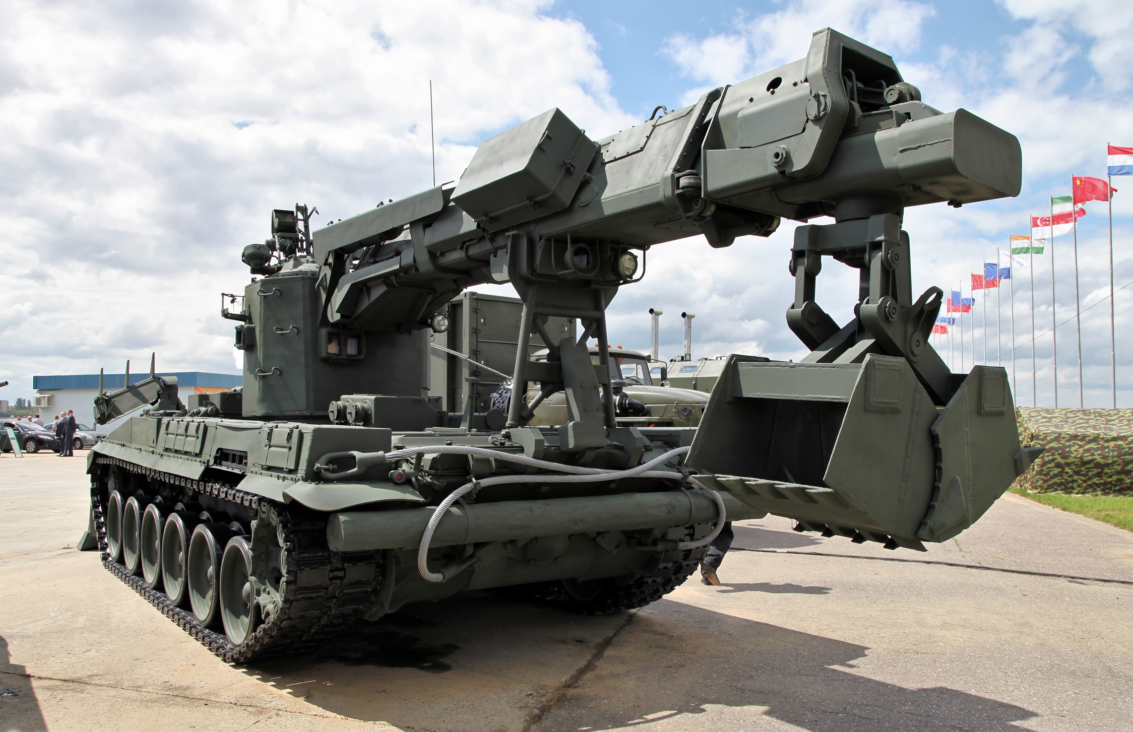 Инженерная машина разграждения ИМР-3М (IMR-3M armoured engineering vehicle)